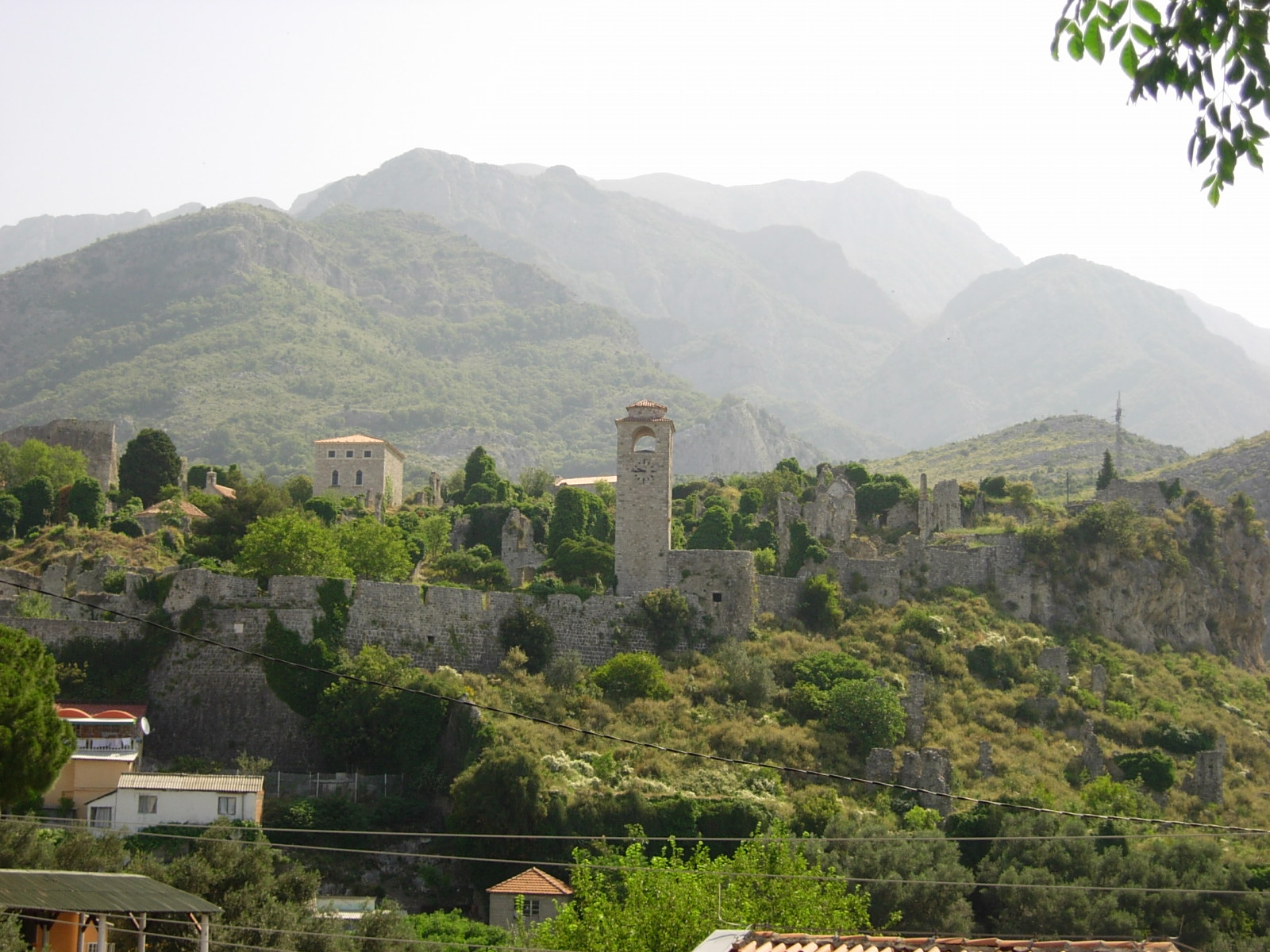 Ruševine Starog Bara